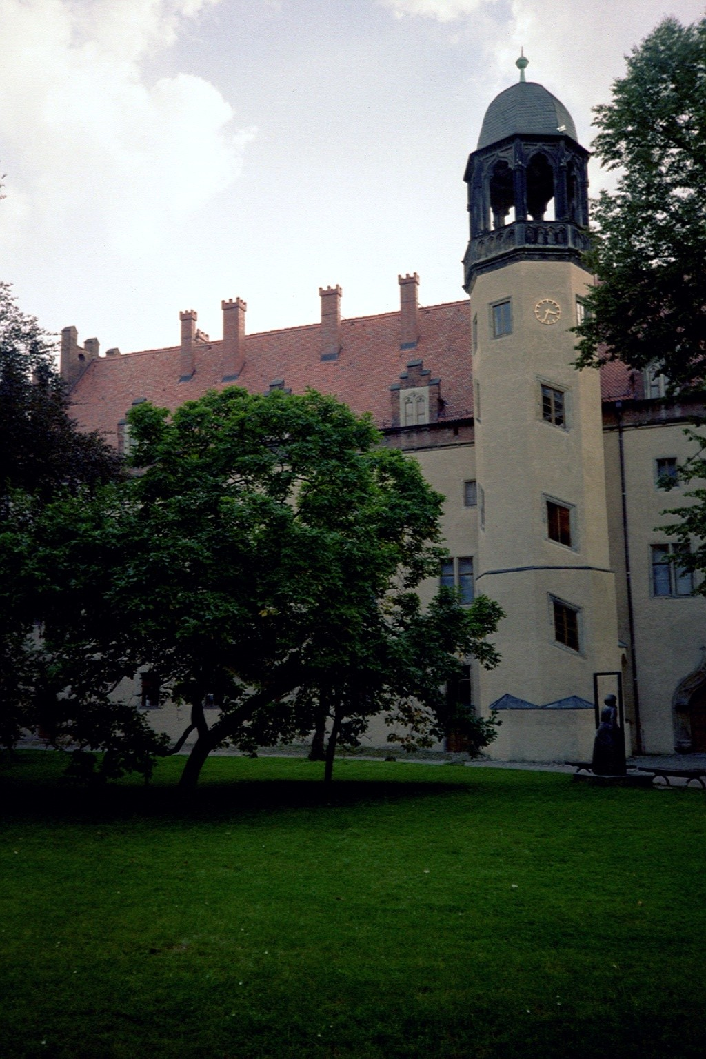 Teil des Lutherhauses in Wittenberg